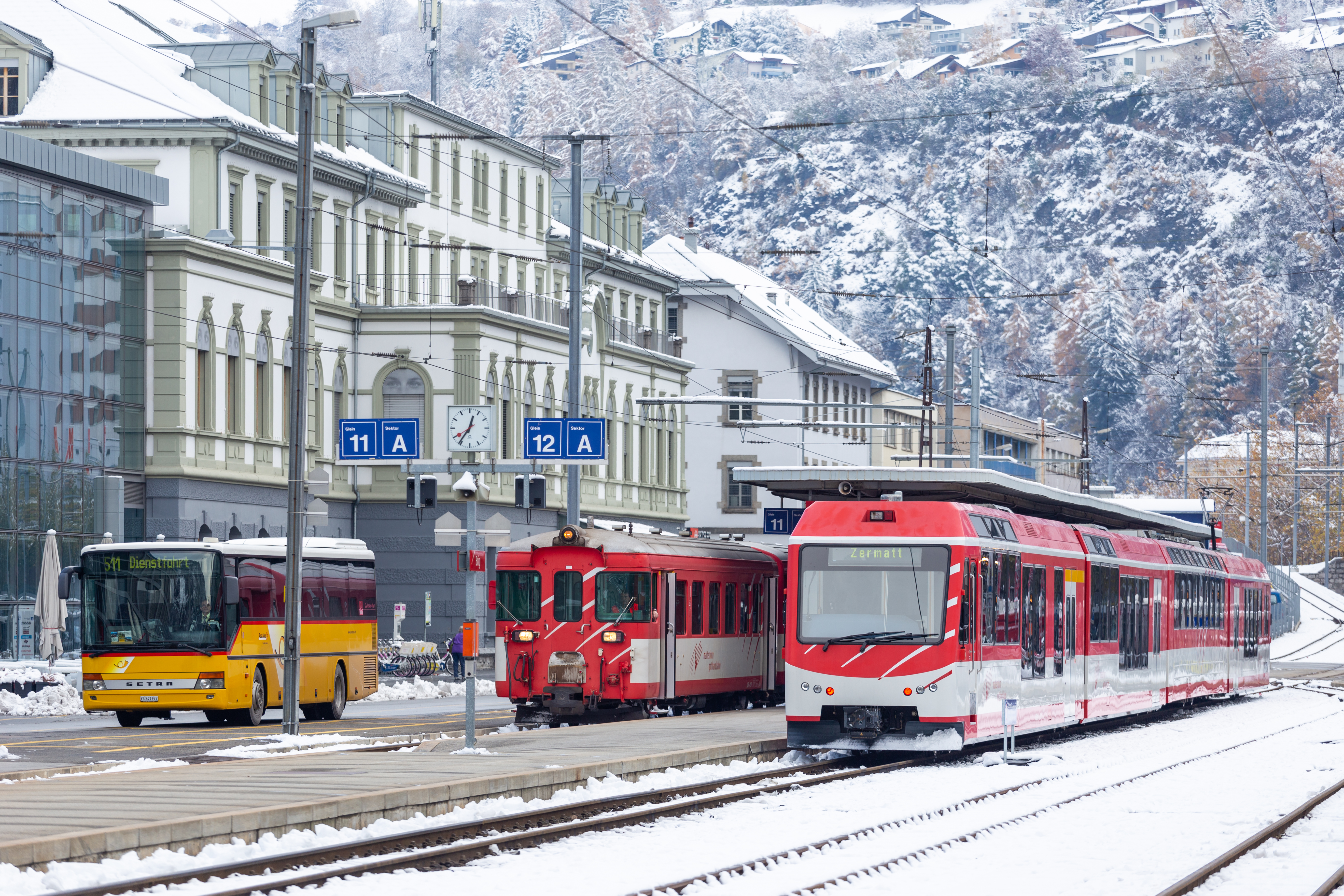 Bahnhof und Bahnhofplatz Brig mit Zügen der Matterhorn-Gotthard-Bahn